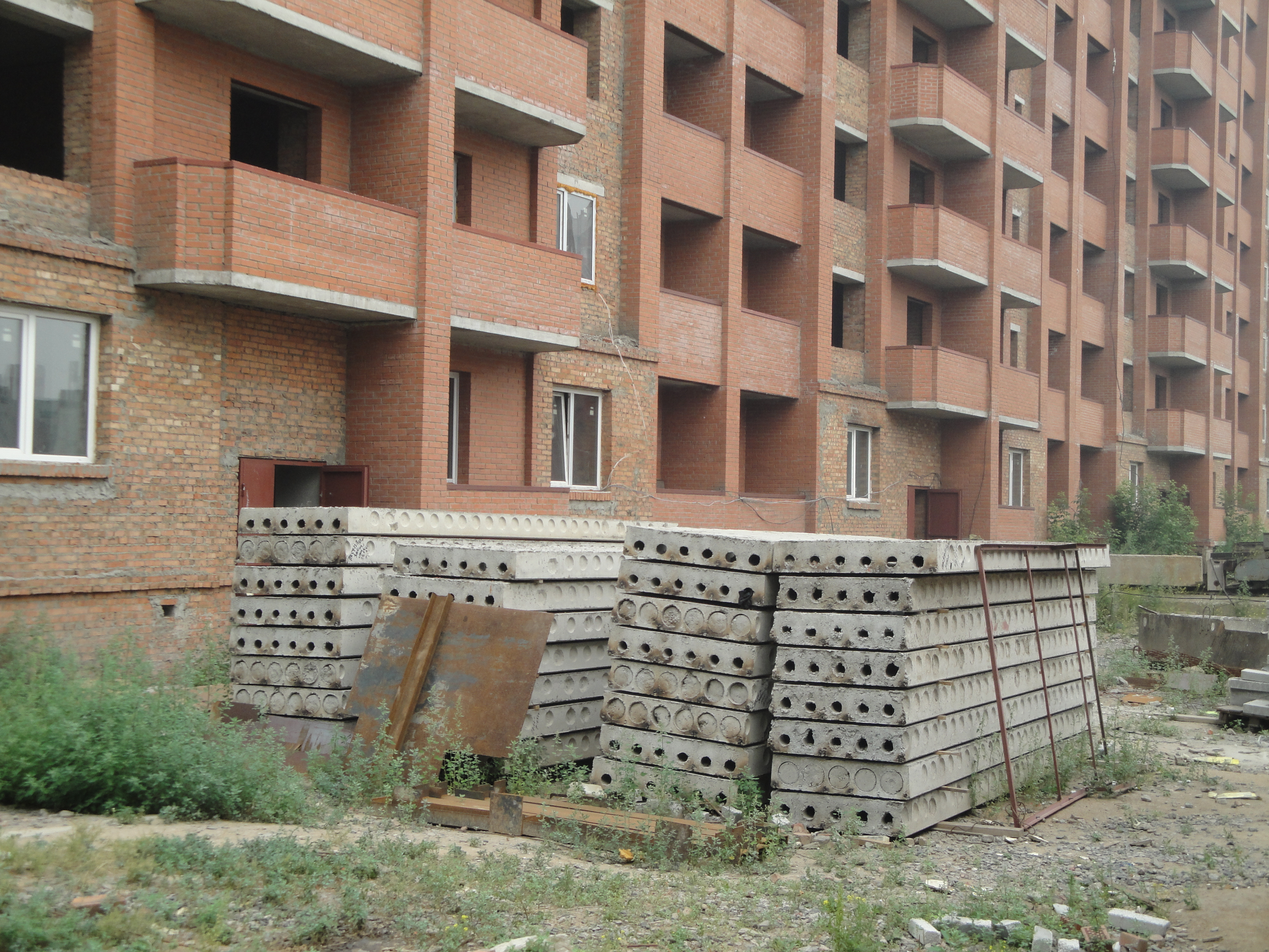 Многопустотные плиты перекрытий - на строительной площадке, Новосибирск